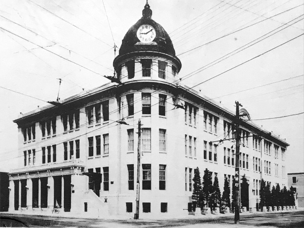 九州電灯鉄道本社ビル。福岡市中央区天神、天神交差点角の天神ビルが建つ場所にあった。